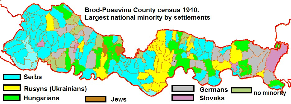 Brodsko posavska županija u danasnjim granicama etnički sastav naselja, najveća nacionalna manjina bez Hrvata